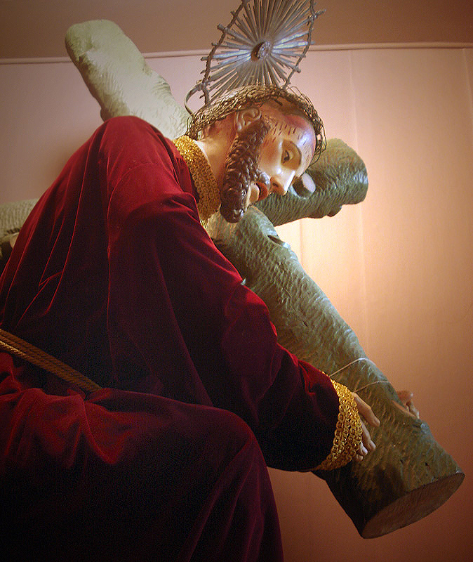 Imagem do Senhor dos Passos, na sacristia da Igreja Matriz de Nossa Senhora da Conceição, Viamão, Brasil.